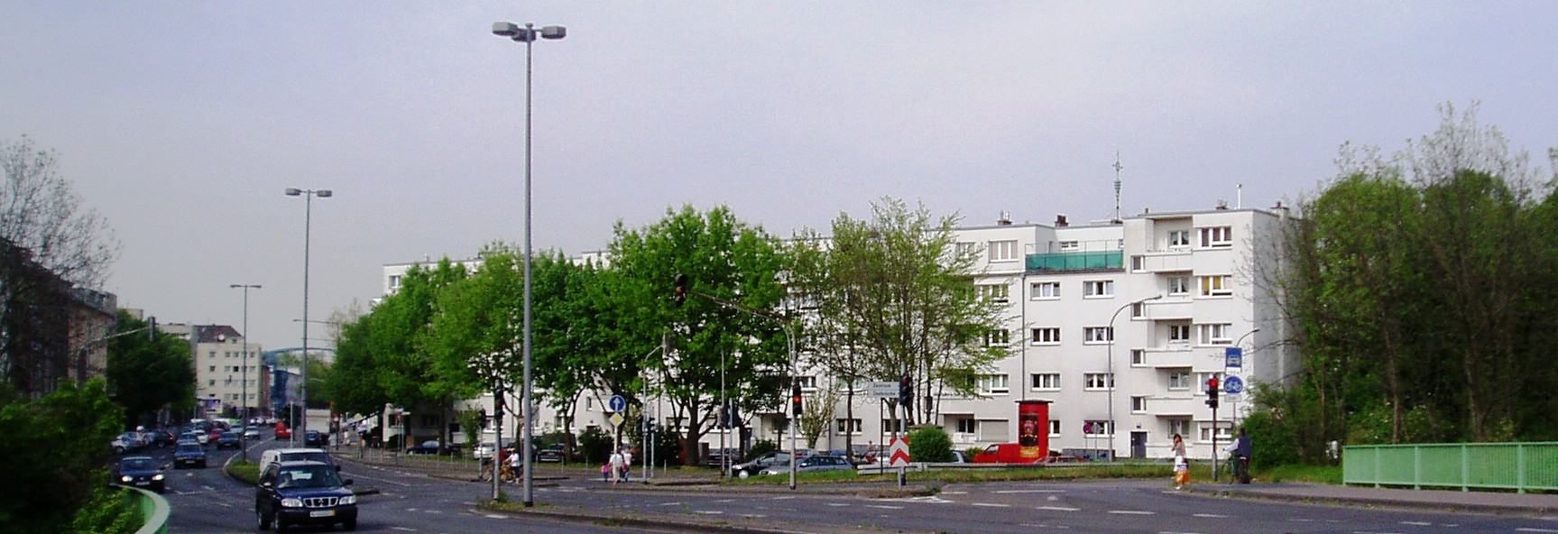 Köln-Buchforst, Panorama - Weiße Stadt